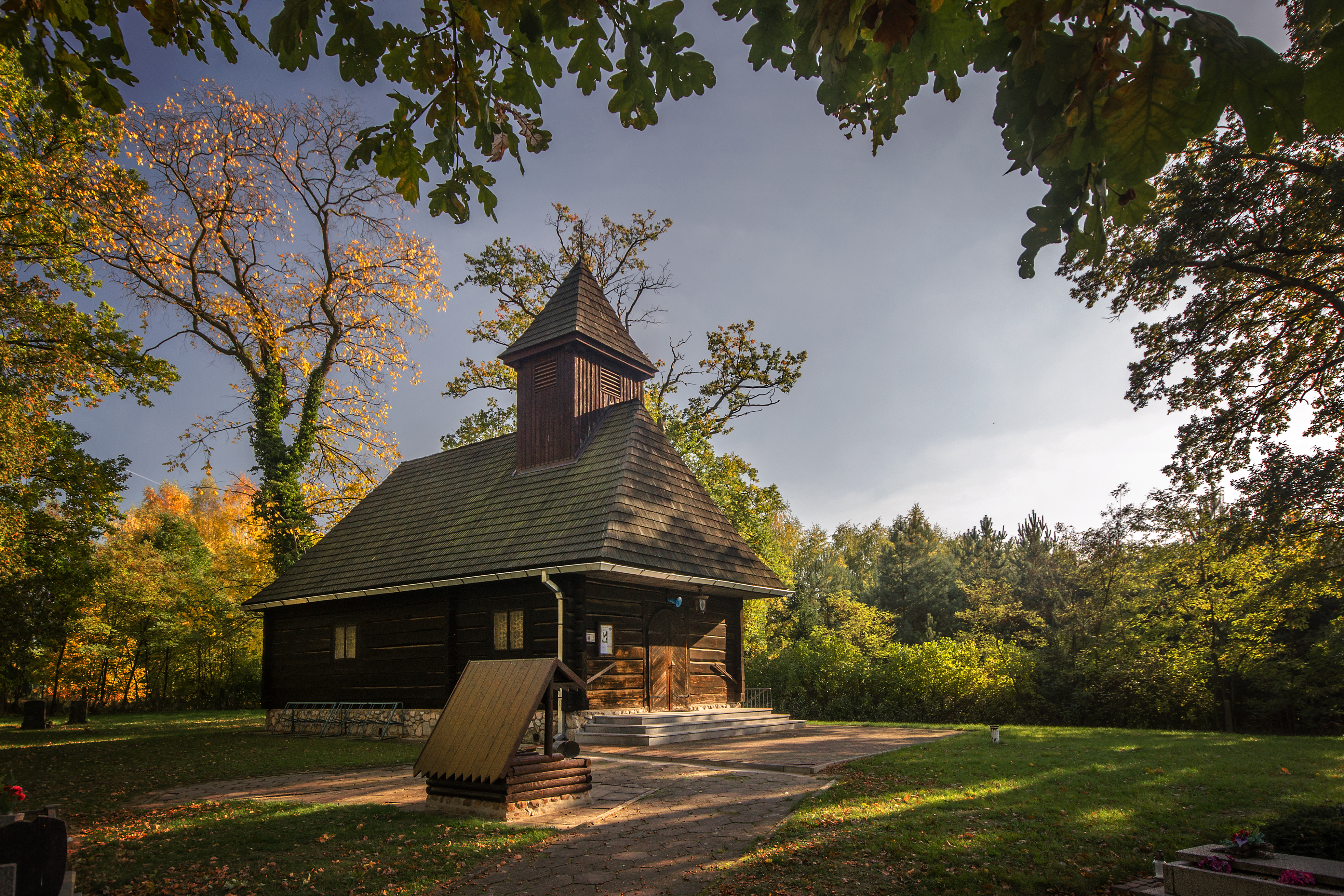 Ligota Górna, kaplica cmentarna, 1787